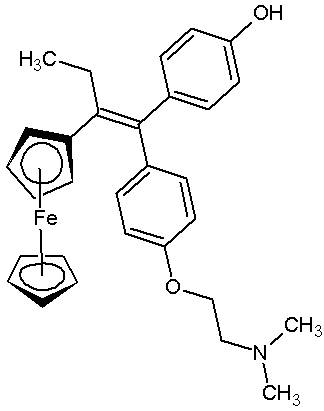 Estructura del hidroxiferrocifeno, un metabolito primario del ferrocifeno